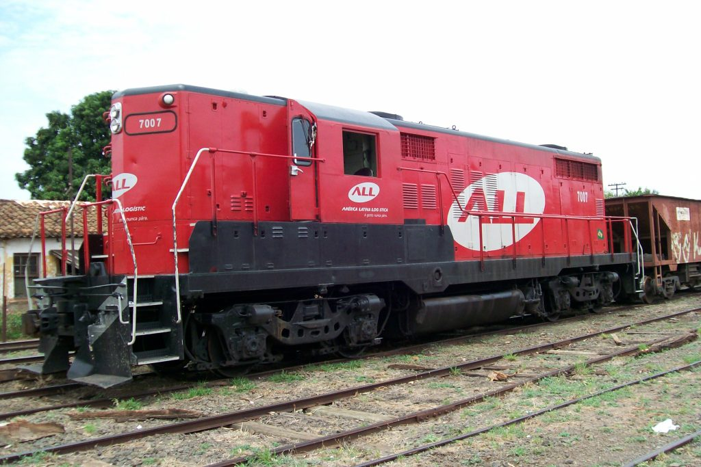 ALL EMD GP18 nº7007, Ex-EFA e Ex-Fepasa - Matão-SP-Brasil